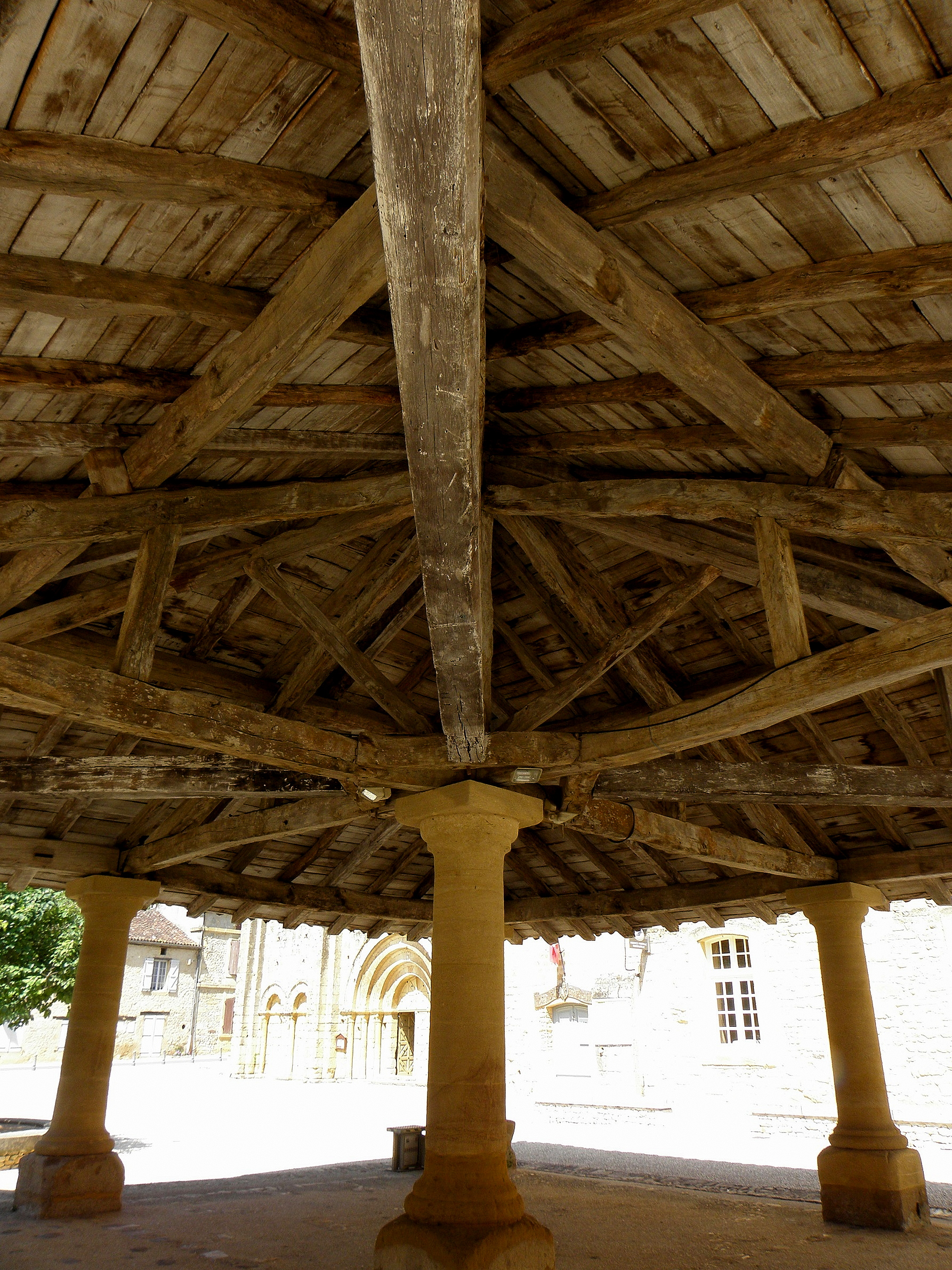 Halle de cadouin. Le Buisson-de-Cadouin (24). .